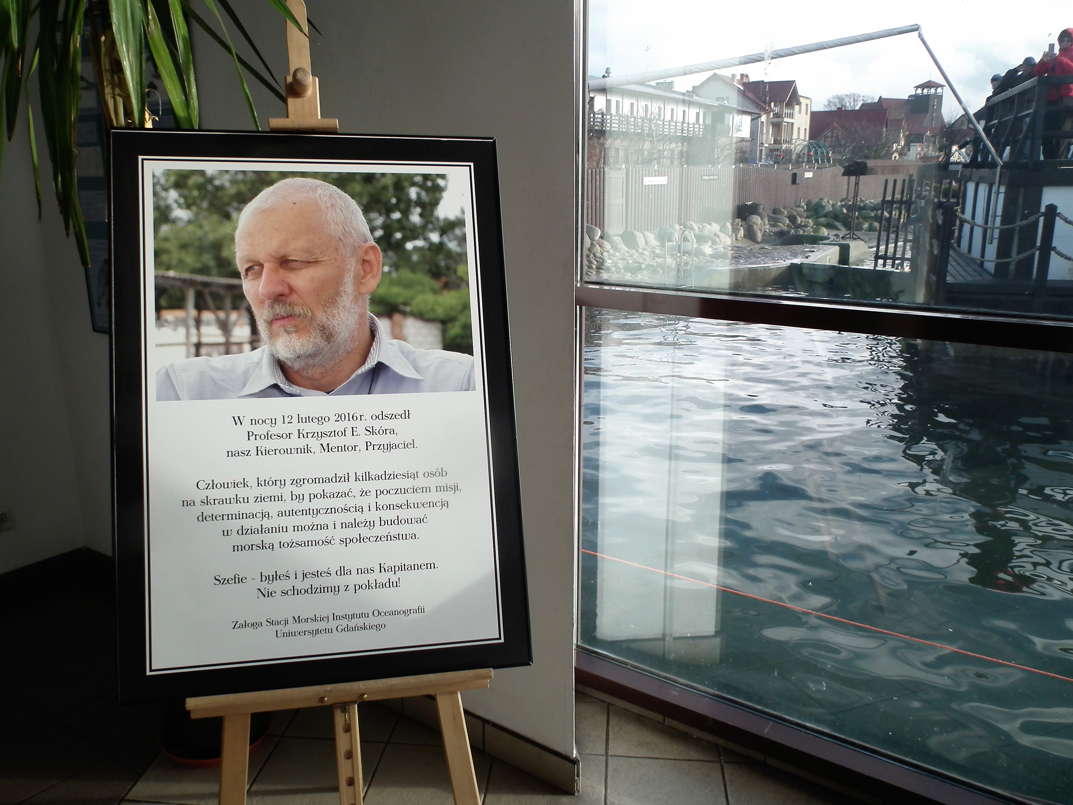 Pamięci Krzysztofa Skóry - Fokarium, Hel.